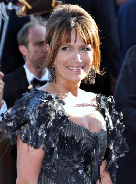 Clémentine Célarié au festival de Cannes.